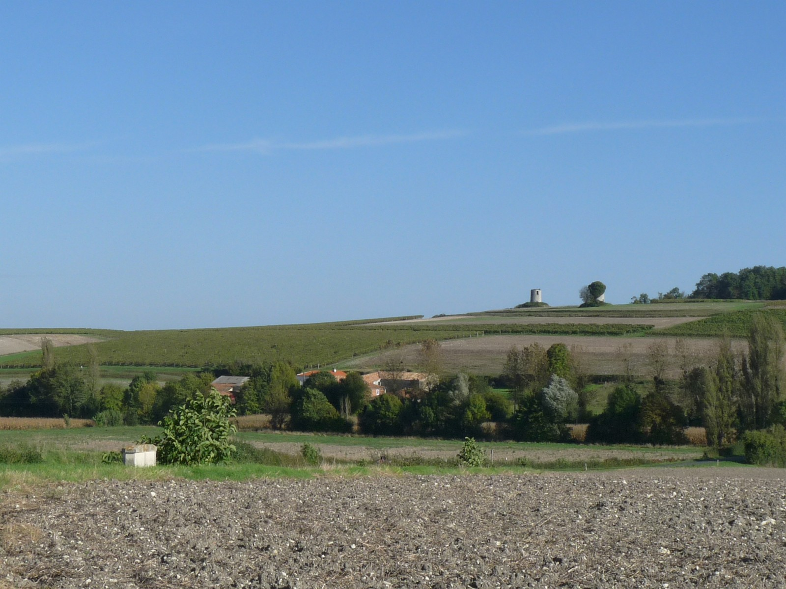 Vallée de la Pimperade, vue près du cimetière, Vibrac, Charente-Maritime, France